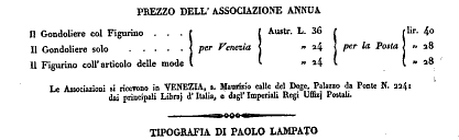 prezzi de Il Gondoliere, periodico edito a Venezia